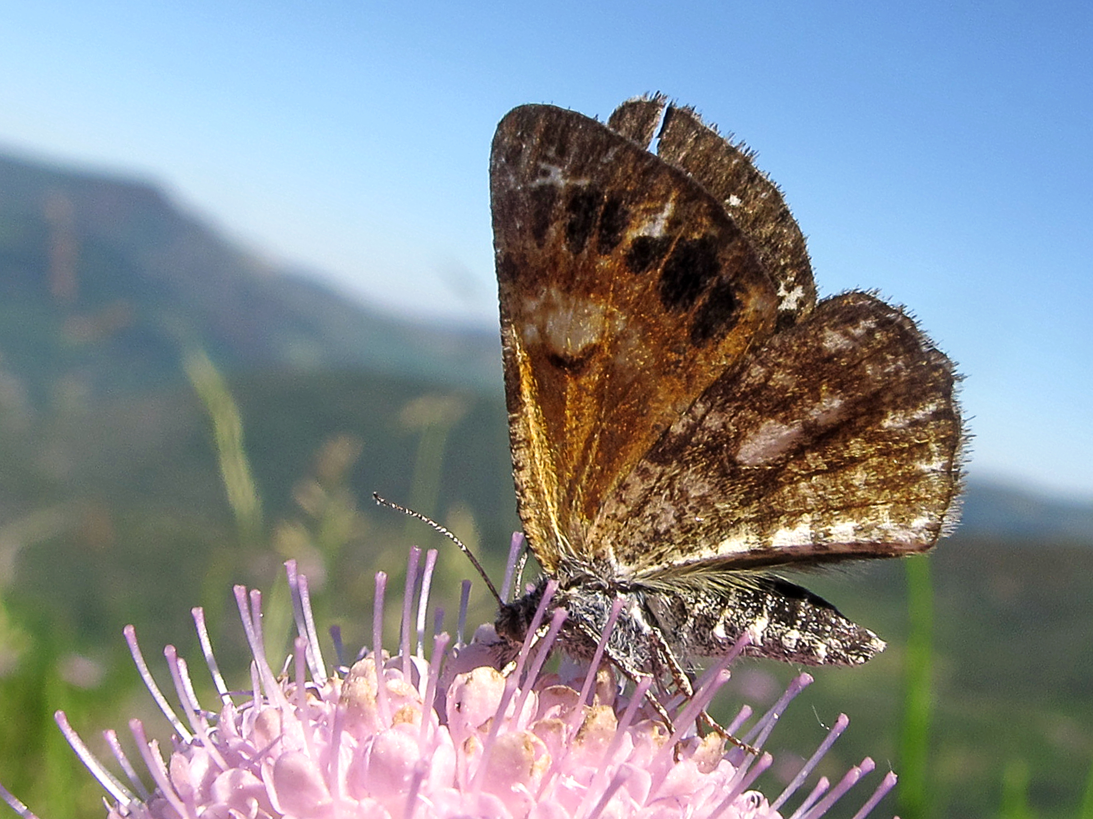 Del sur de Europa Los adultos pueden observarse en primavera principios de verano volando en los dias soleados En invierno la especie se encuentra en forma de crisalida enterrada en el suelo. Como plantas nutricias de las orugas se citan; Cytisus, Genista, Sarothamus, Spartium y Ulex. El macho, es identificado por las antenas plumosas que le adornan. Fotografiada en Sierra del Courel (Lugo)